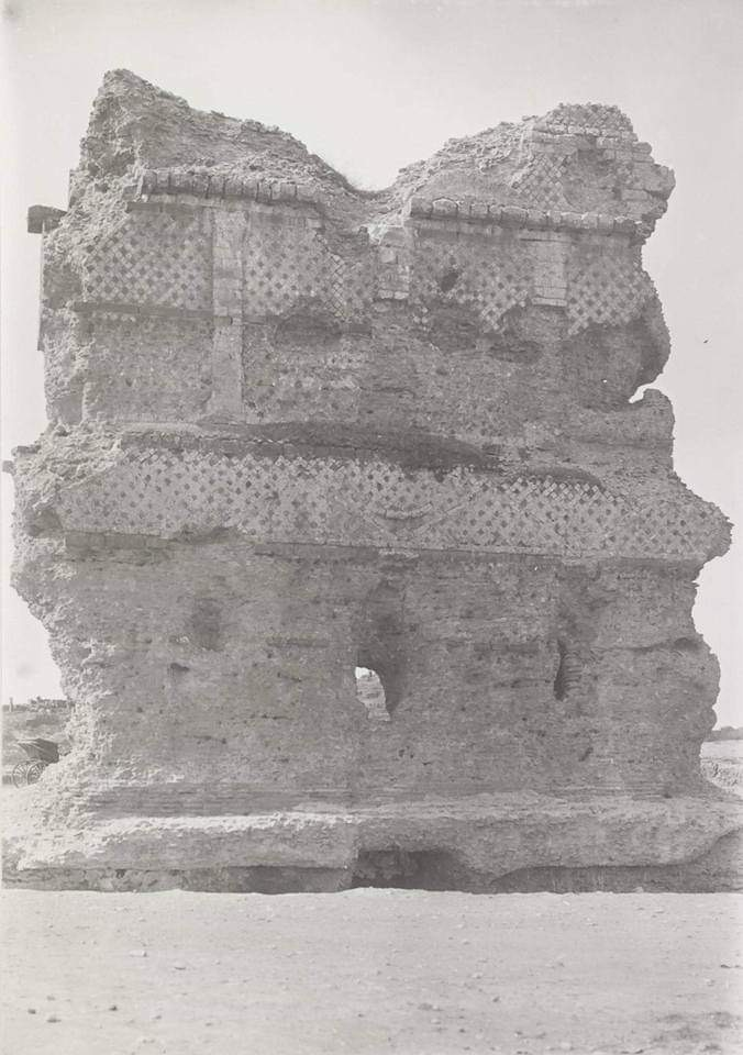 Das Grabmal des Samsigeramos von Emesa